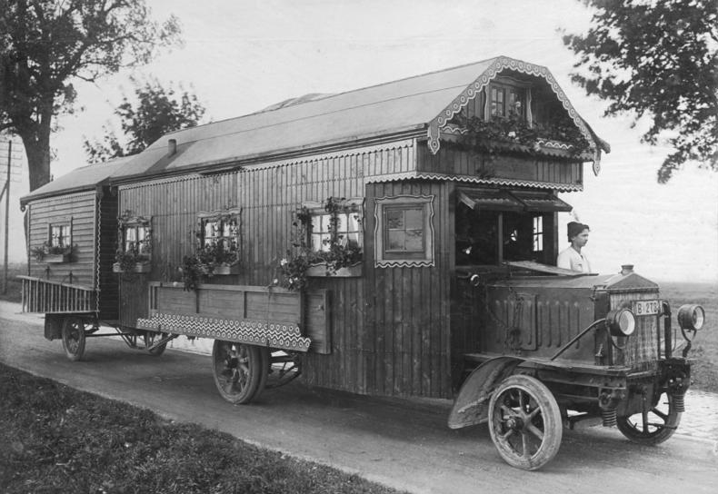 ADN-ZB Deutschland 1922: Ein fahrbares Landhaus für eine große Familie wird gezeigt. Der Wohnwagen besteht aus Wohnstube, drei Schlafzimmern und der Küche. 10.11.1922 1836-22